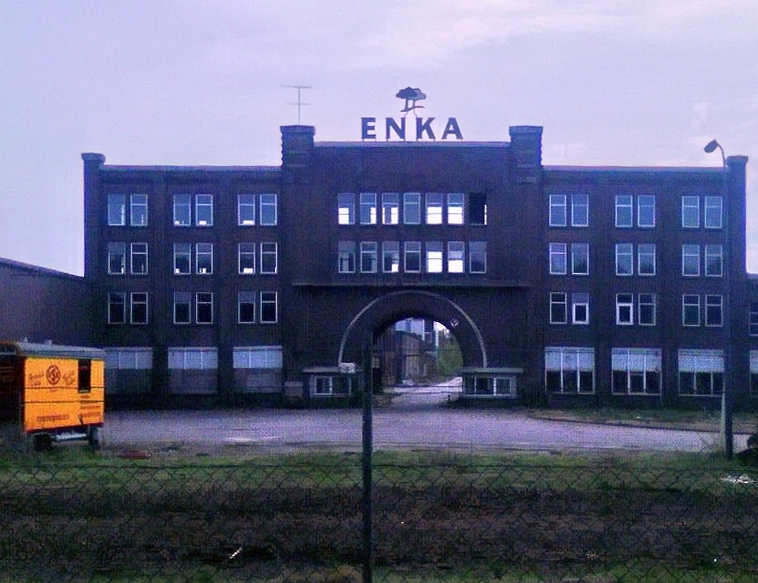 Enka